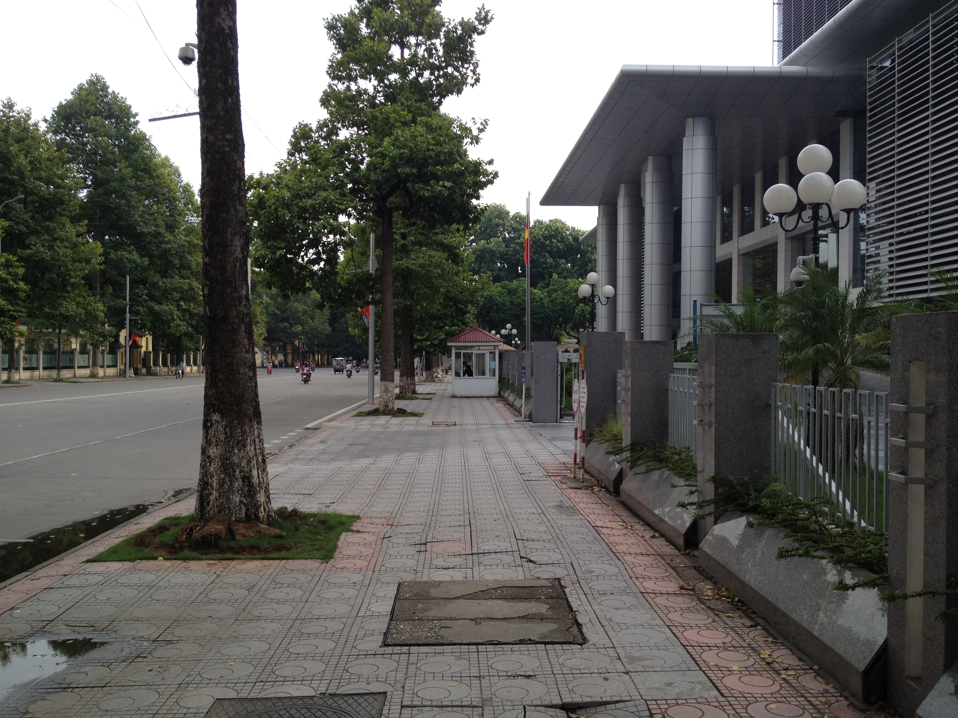 Hà Nội, Việt Nam.